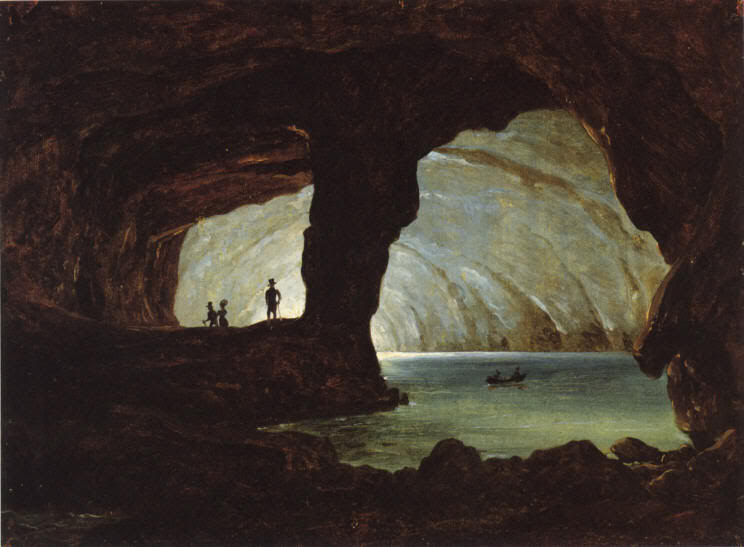 Konstantin von Kügelgen (1833), The Blue Grotto at Capri